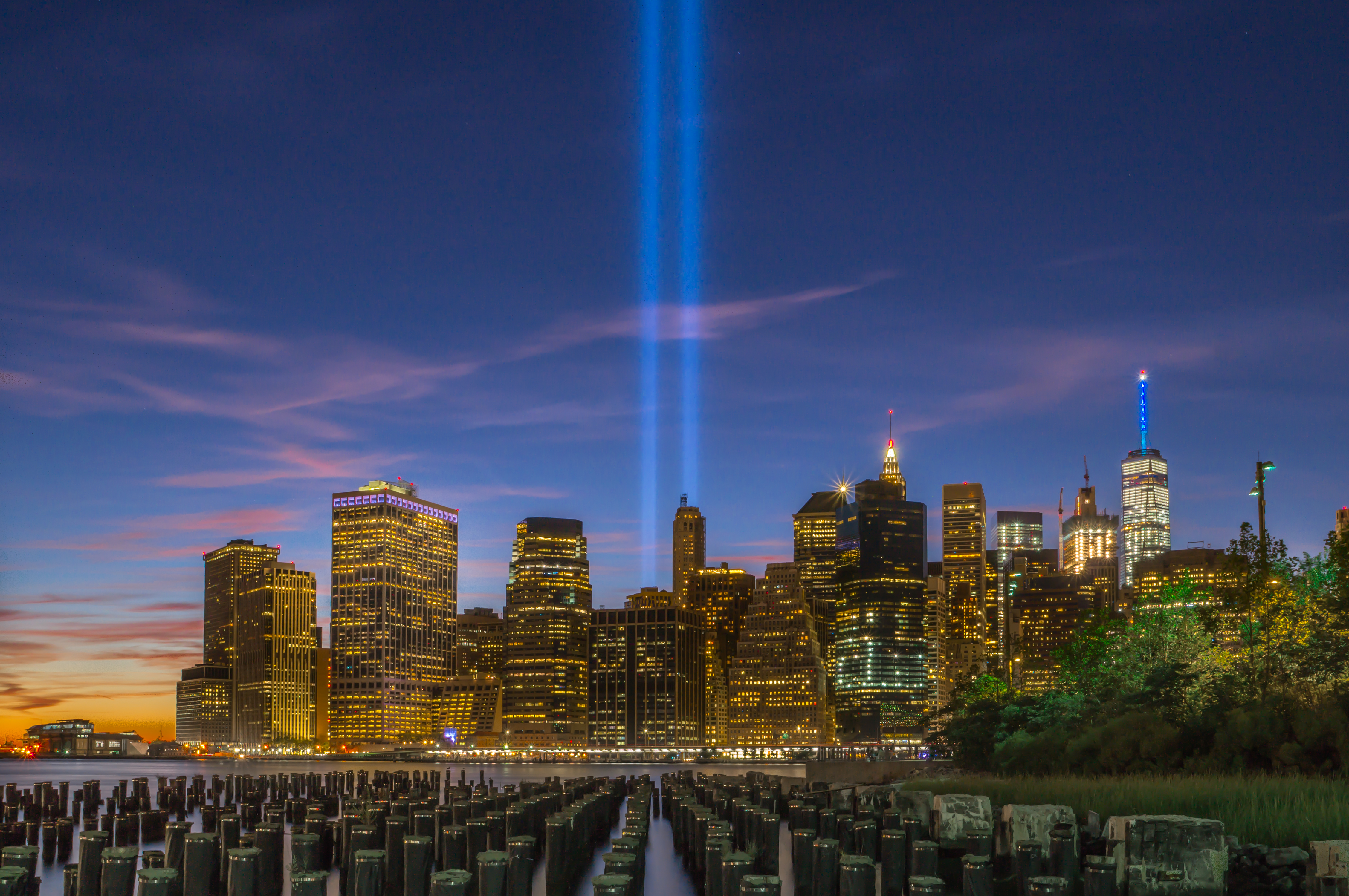 Die Tribute in Light am 11.09.2016 von Brooklyn aus fotografiert.